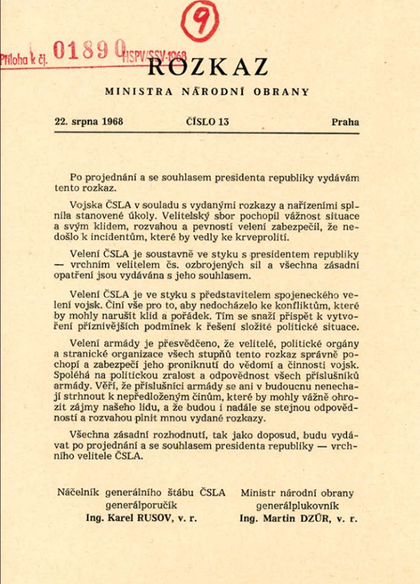 Armáda dostává rozkaz ministra obrany Martina Dzúra. Dzúr vojákům sděluje, že spoléhá na jejich politickou zralost a odpovědnost.